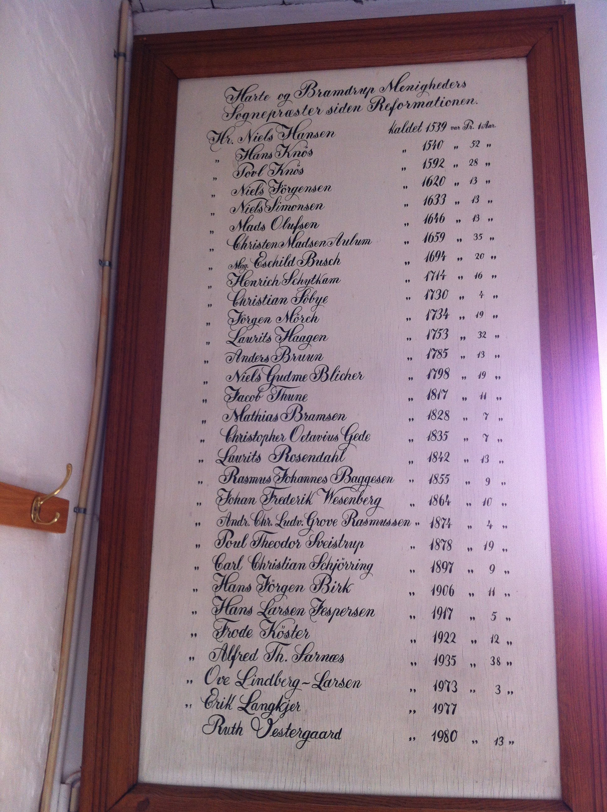 Harte og Bramdrups menigheders sognepræster siden reformationen